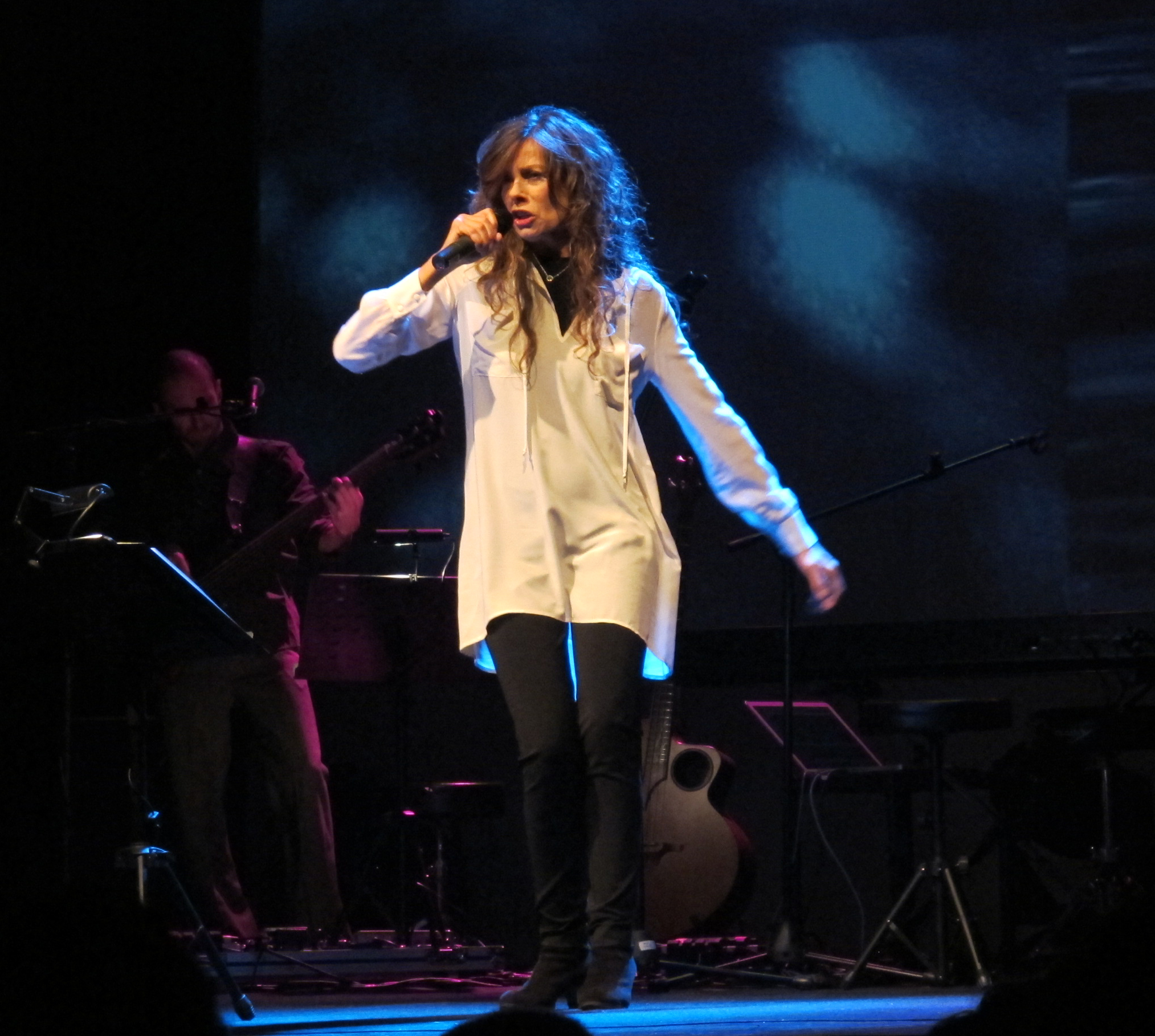 Alice, Firenze